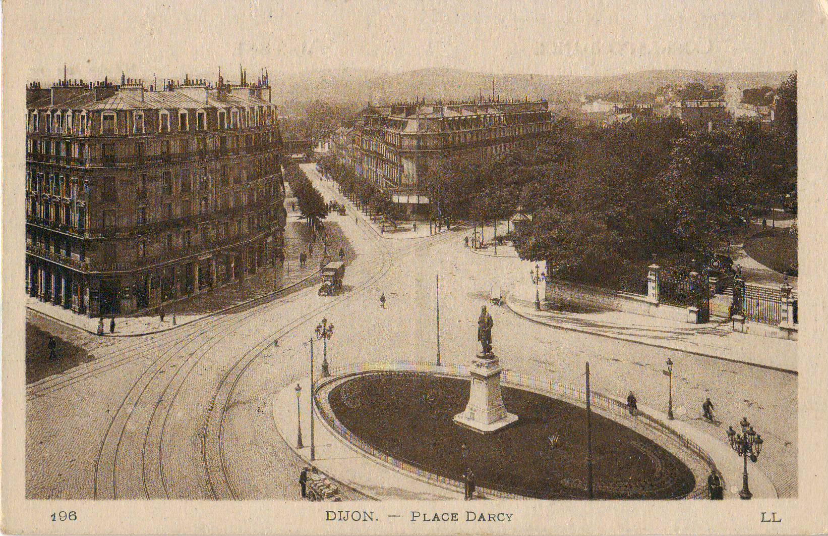 Carte postale ancienne éditée par LL, n°198 : DIJON- Place Darcy